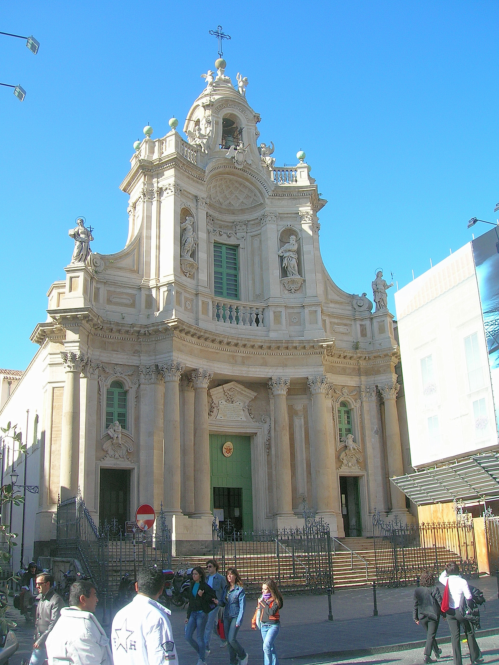 Santa Maria dell'Elemosina (Catania)